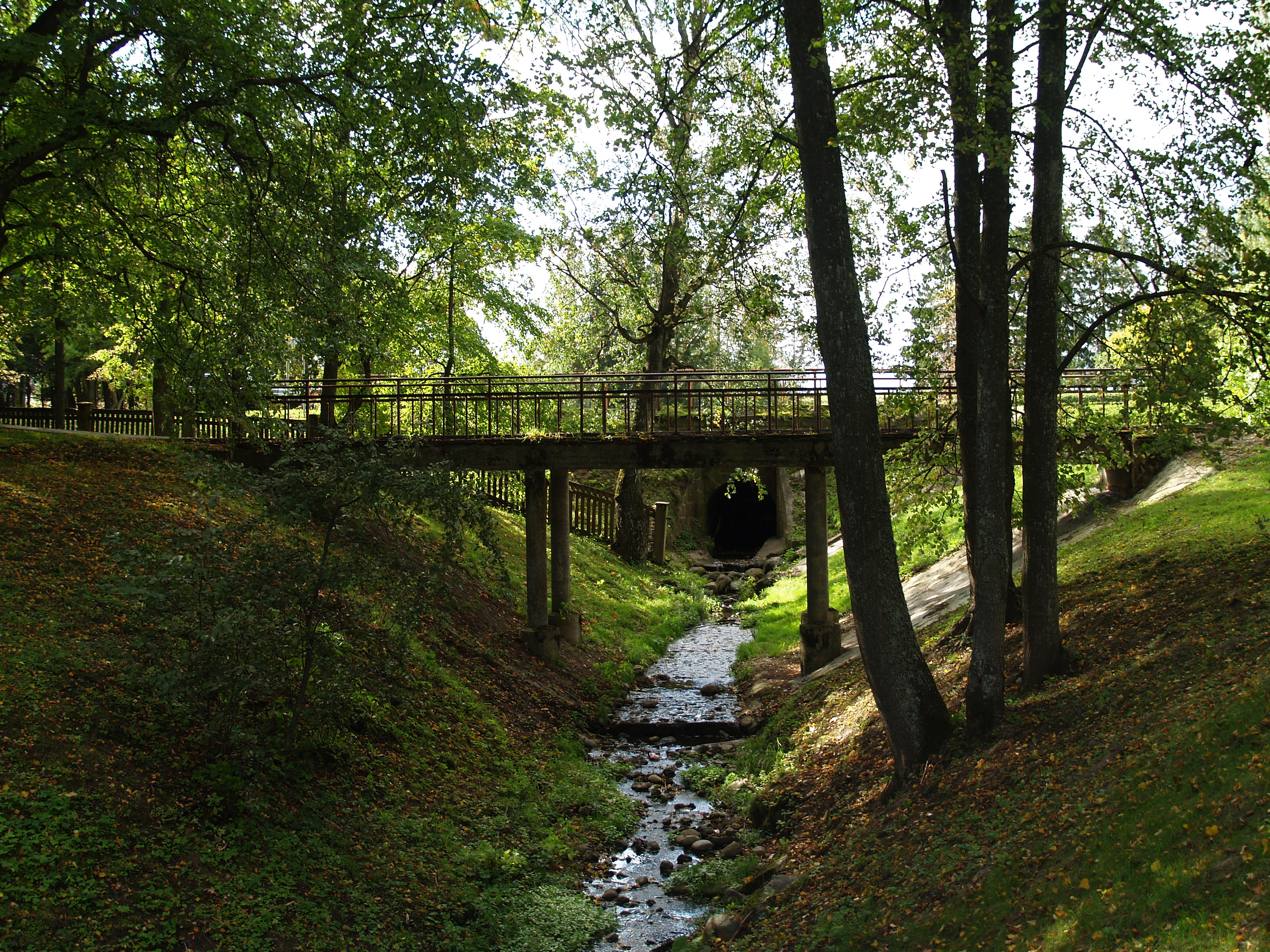 Ülenurme mõisapark